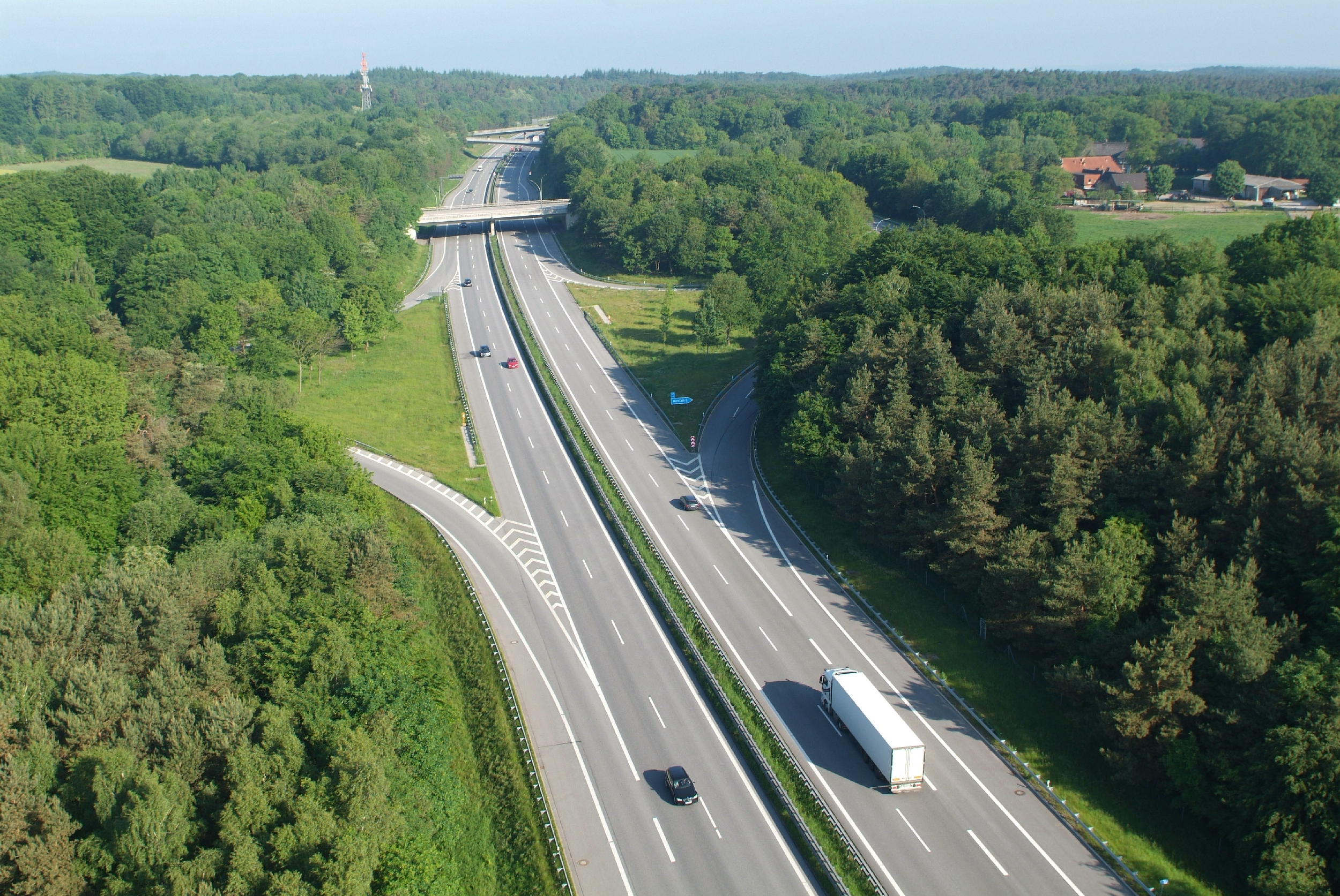 Projekt Heißluftballon. Anschlussstelle Marmstorf der Bundesautobahn 7.